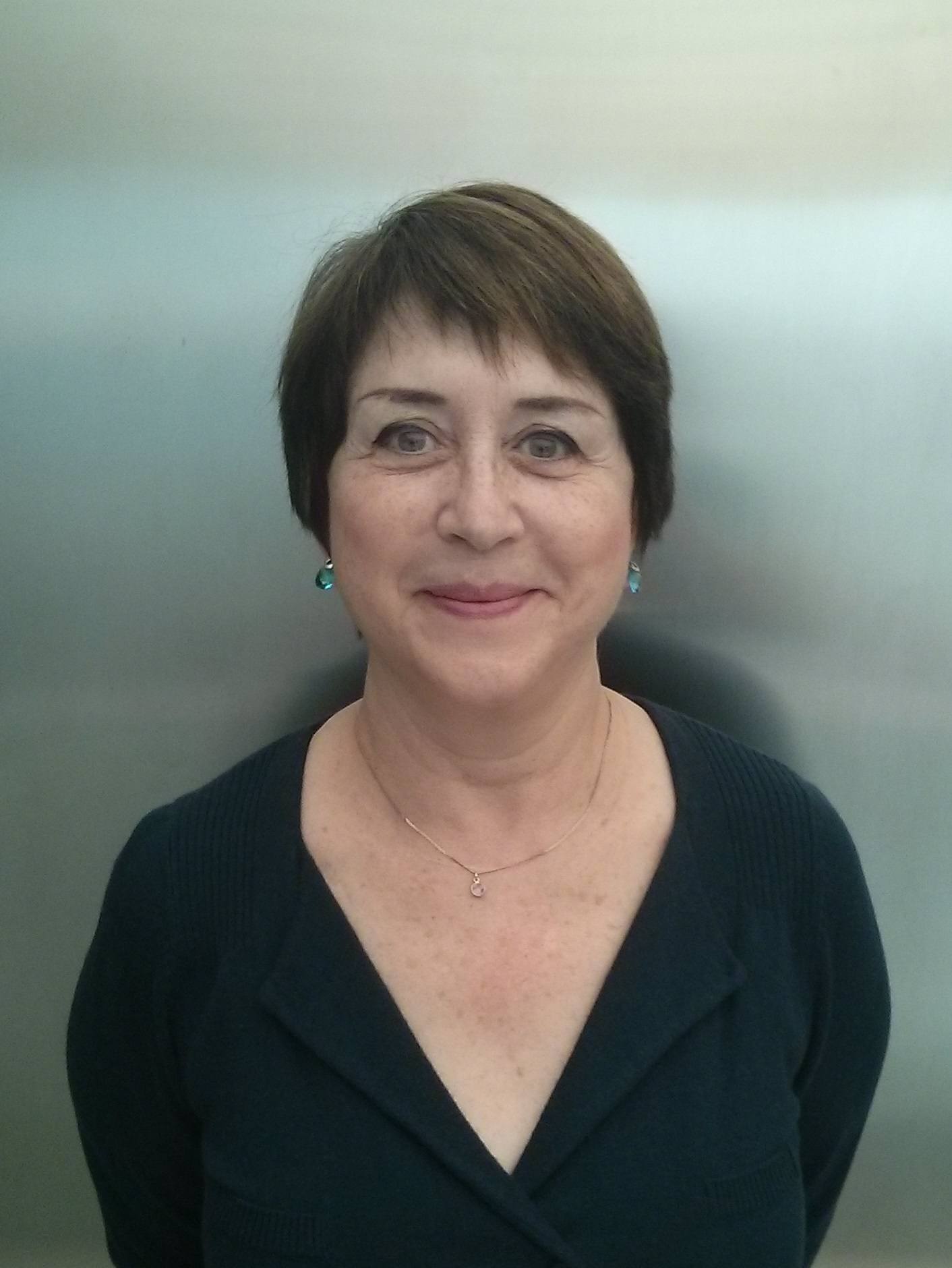 Gemma Lienas i Massot (1951-), escriptora catalana. Fotografia presa en un acte del Dia Mundial de la poesia 2014 organitzat per Amical Wikimedia.